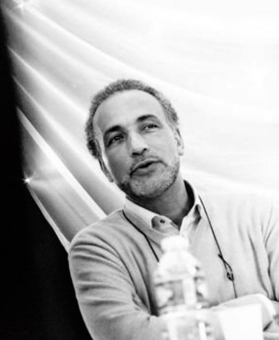 Tariq Ramadan en 2016